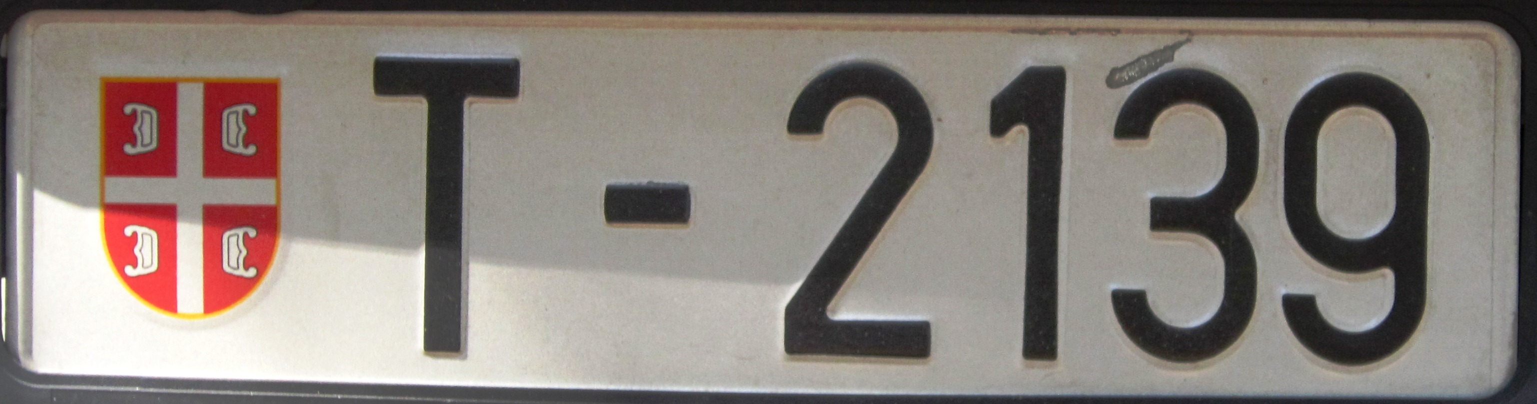 Servië overheids kenteken plaat